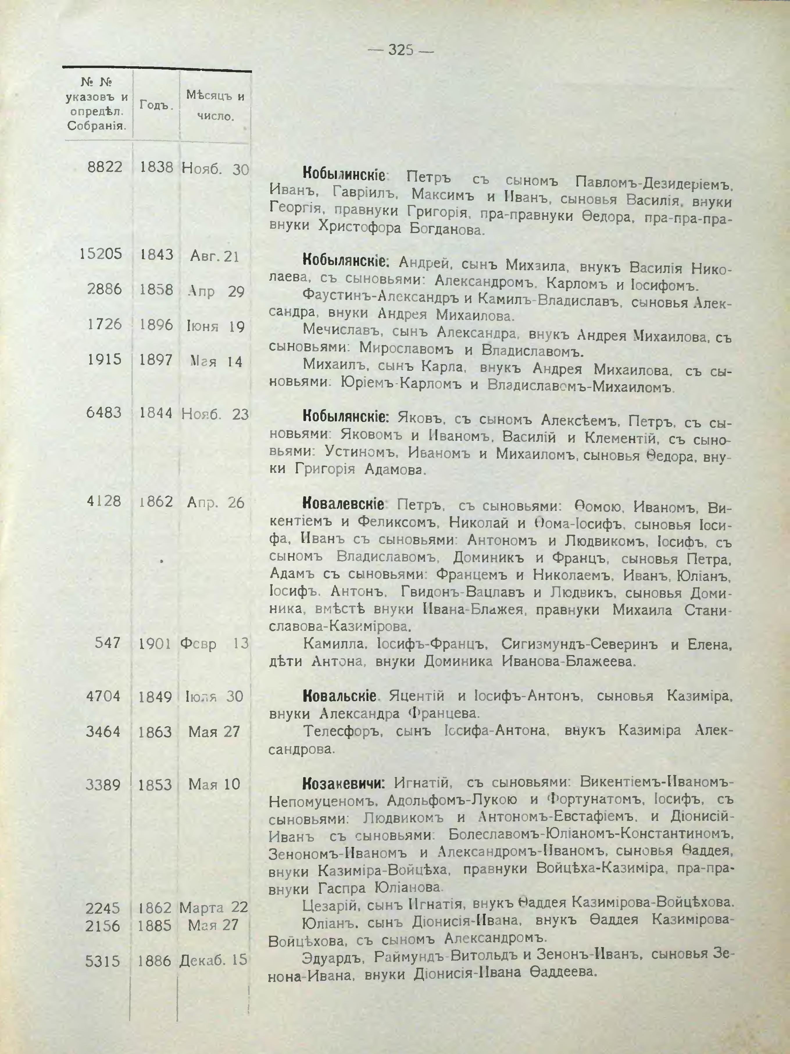 Кобылинские в Списке дворян Волынской губернии, часть 6-ая, стр. 325